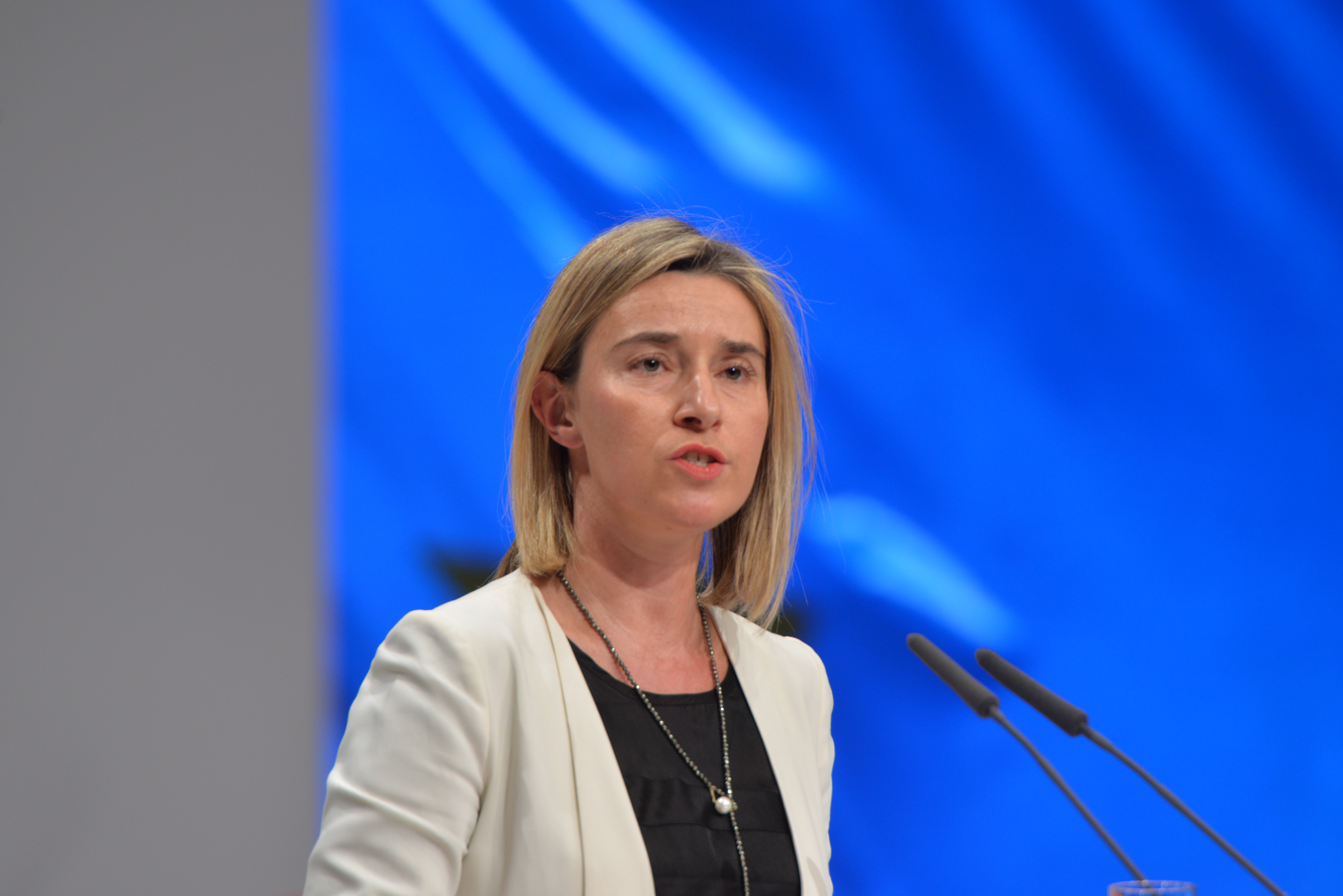 Federica Mogherini auf dem SPD Bundesparteitag Berlin, 10.-12. Dezember 2015, CityCube, Messe Berlin